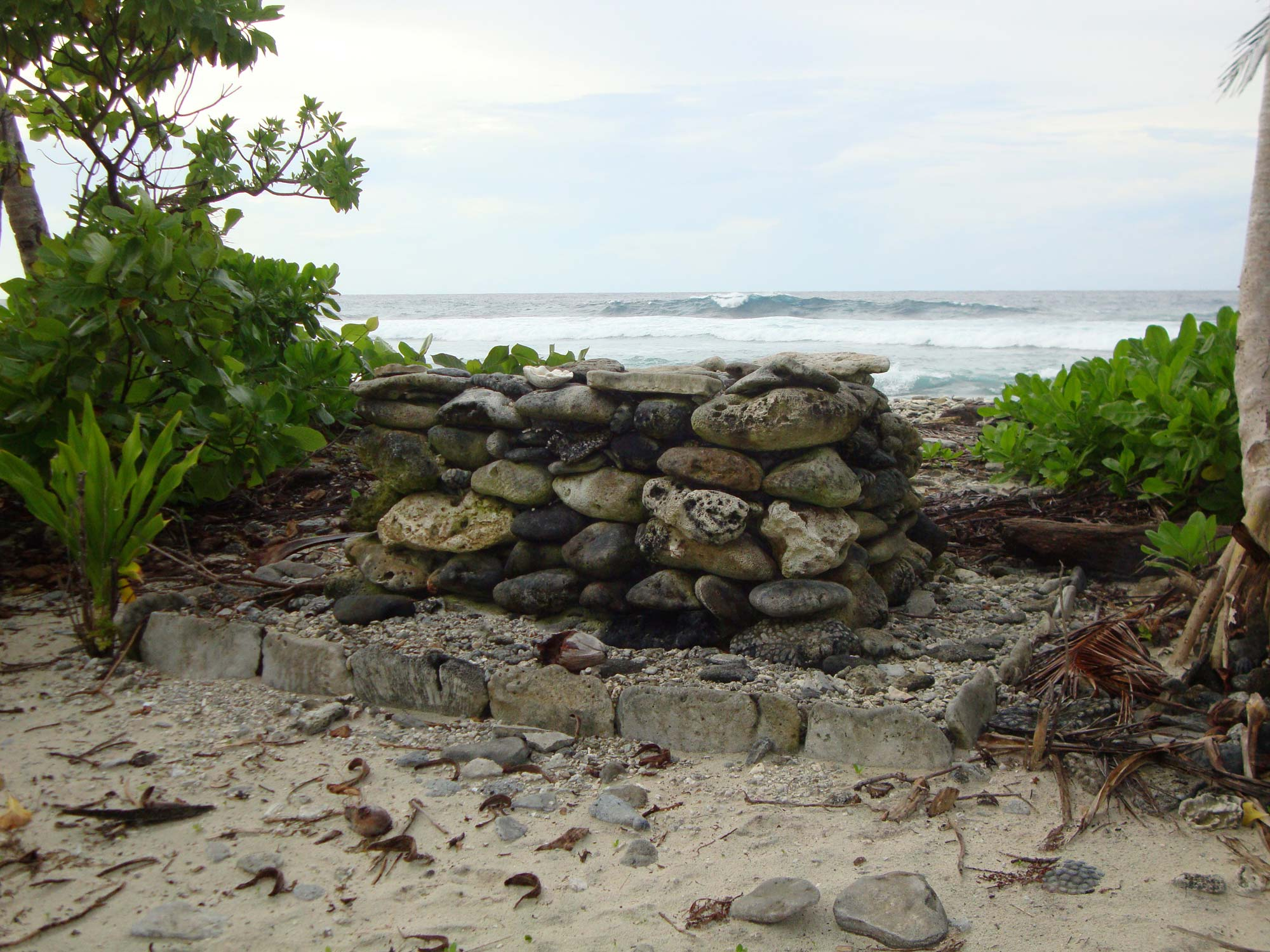 warmemorial at Ukiangang point, Butaritari, Kiribati